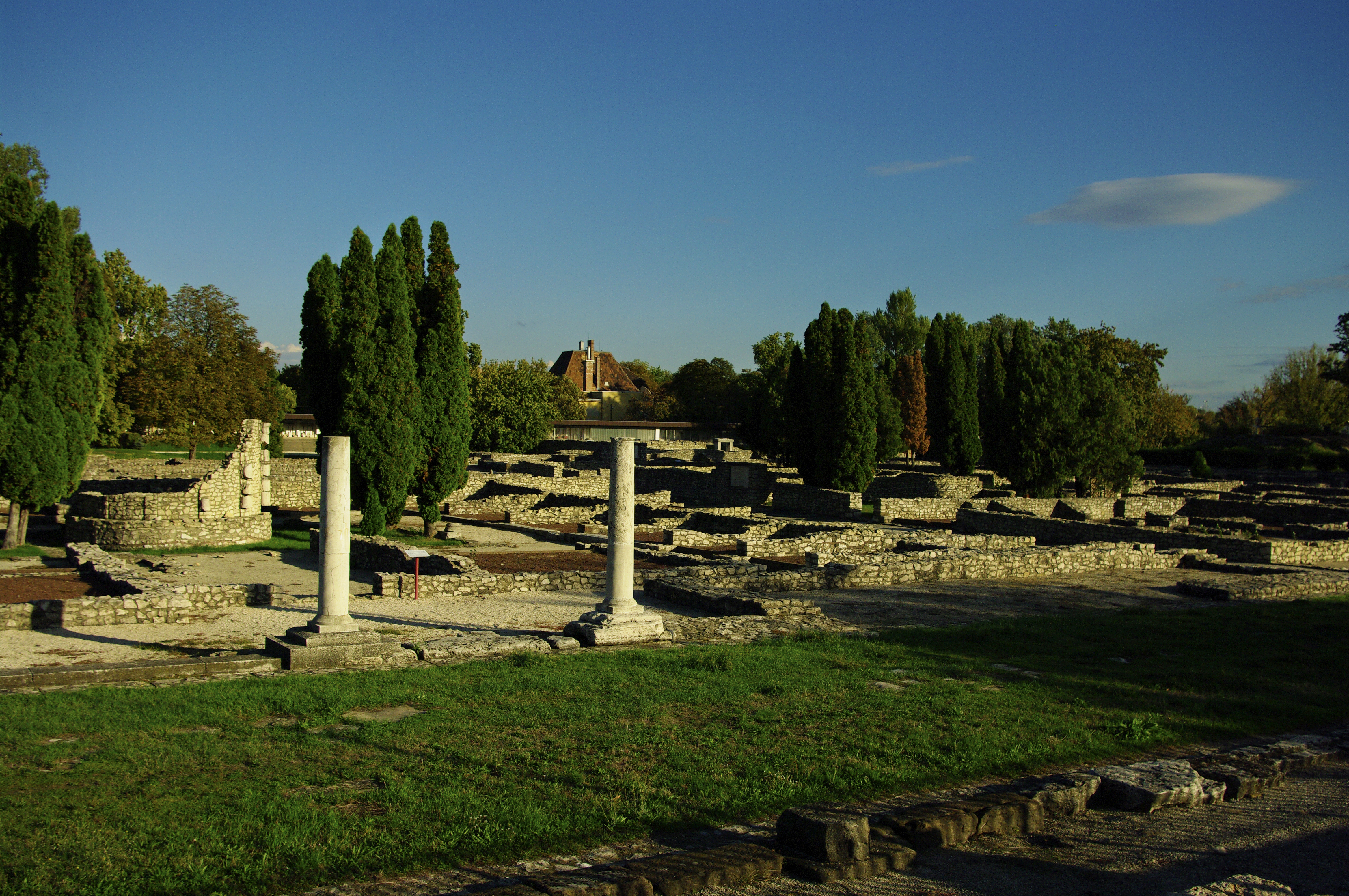 római polgárváros romegyüttese This is a photo of a monument in Hungary. Identifier: 392